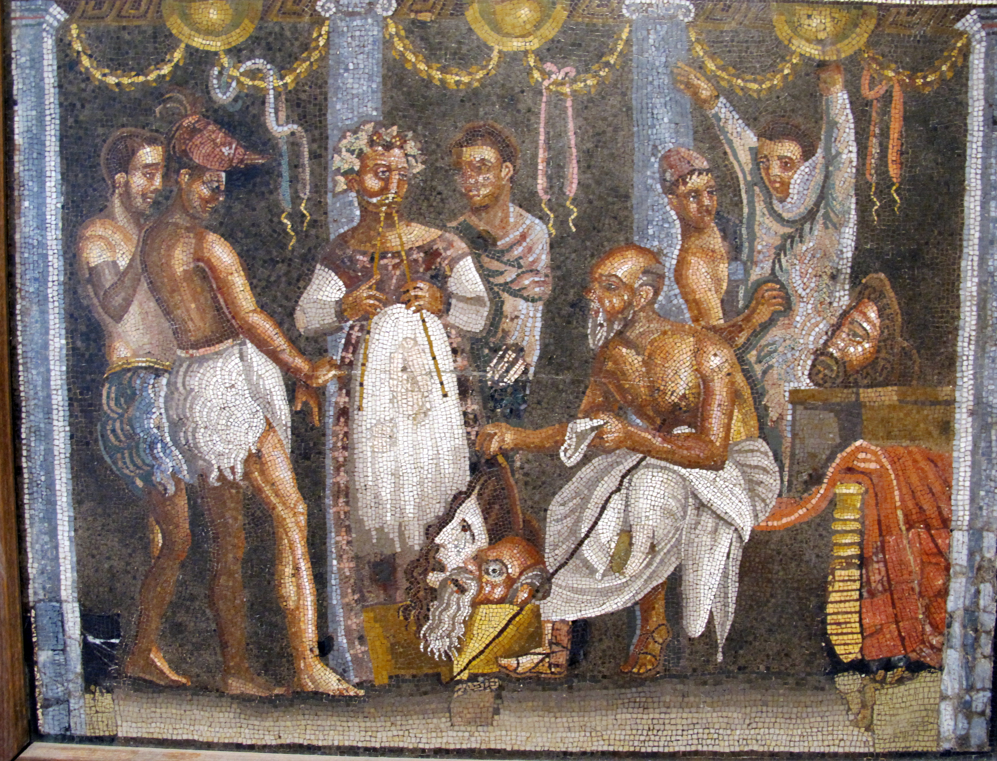 Mosaics in the Museo Archeologico (Naples)